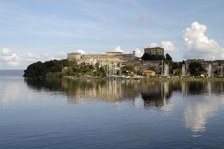 Capodimonte (VT, Italy)